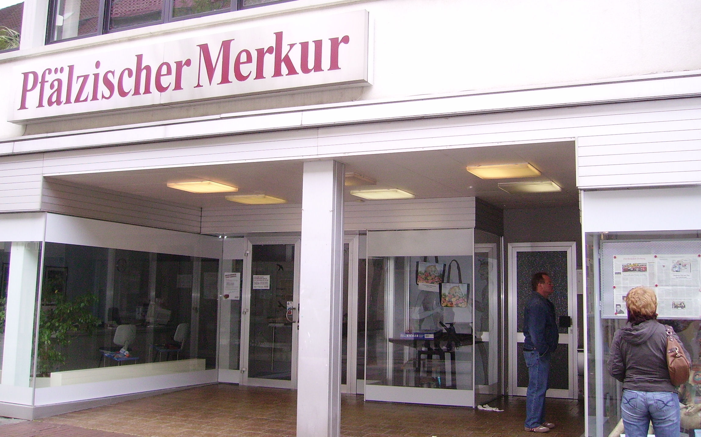 newspaper building in Zweibrücken, Germany